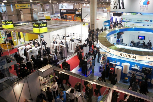 в 2012 выставку посетило 23 610 уникальных посетителей